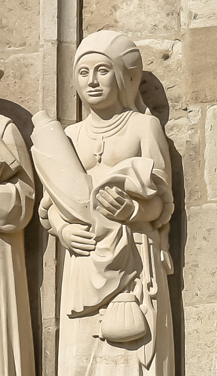 Figur der Fygen Lutzenkirchen am Rathausturm Köln